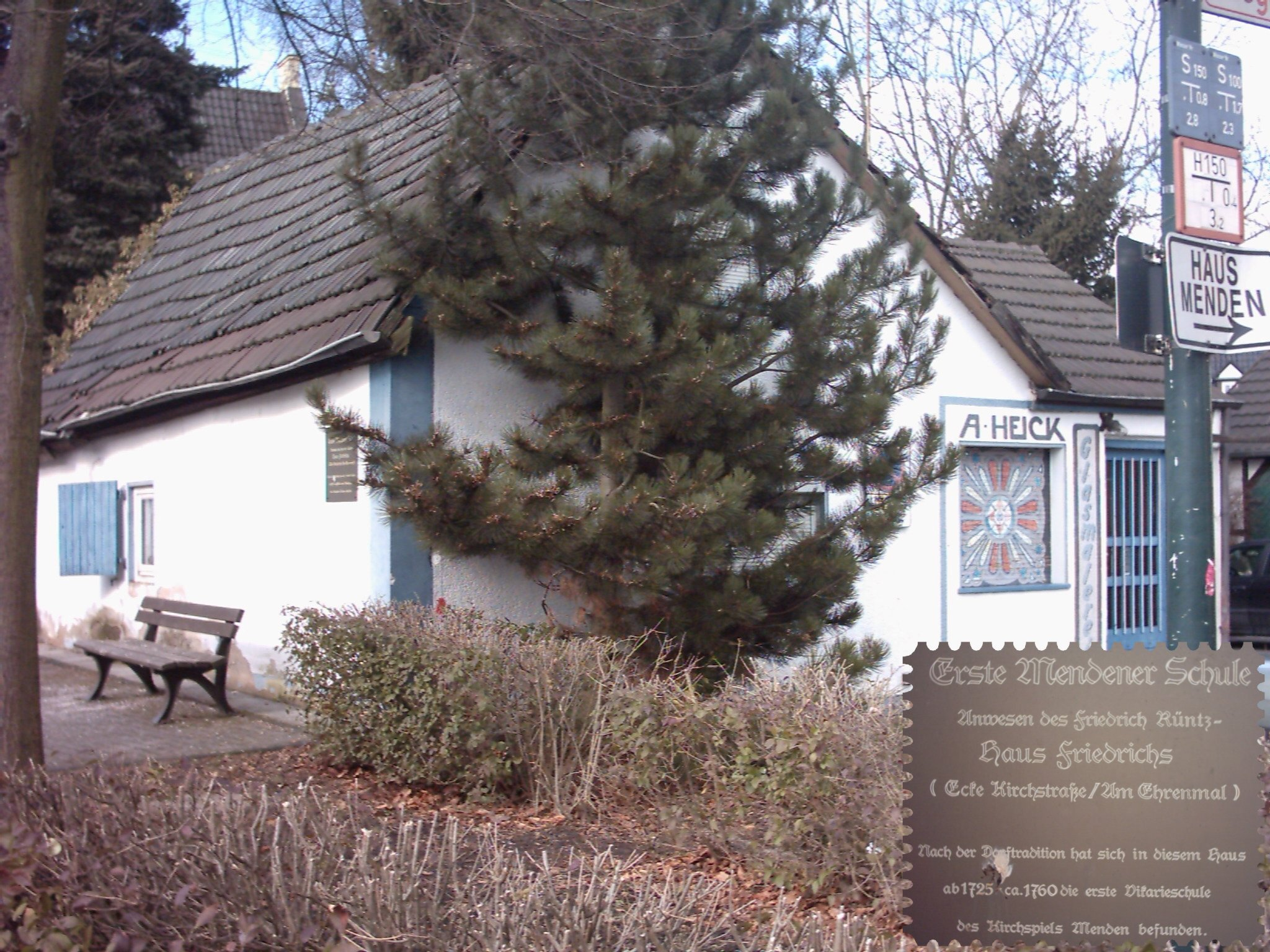 Erste Schule von Menden, Sankt Augustin